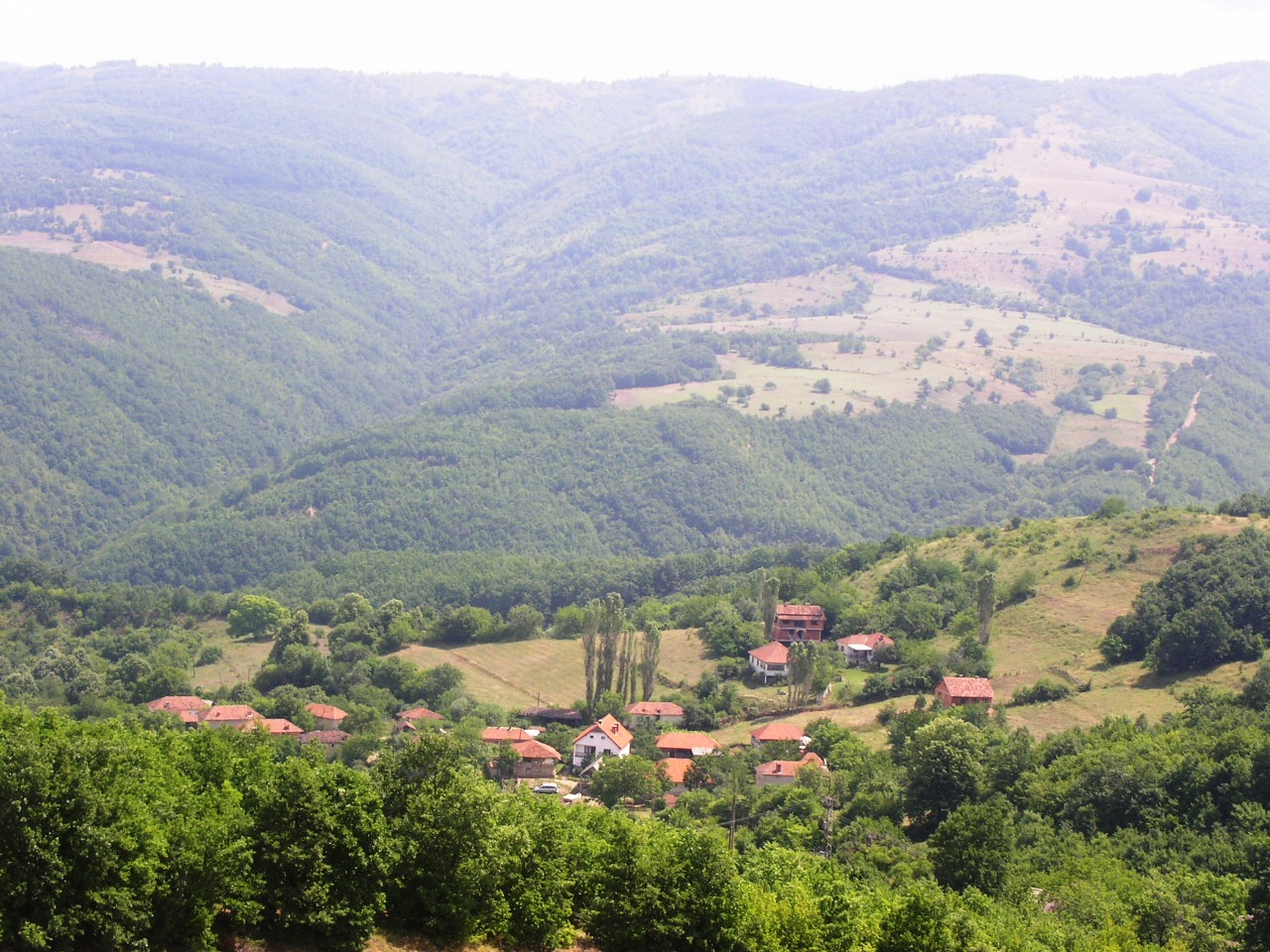 Kokaj